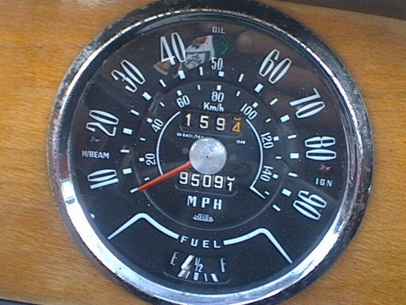 Triumph Herald Speedometer